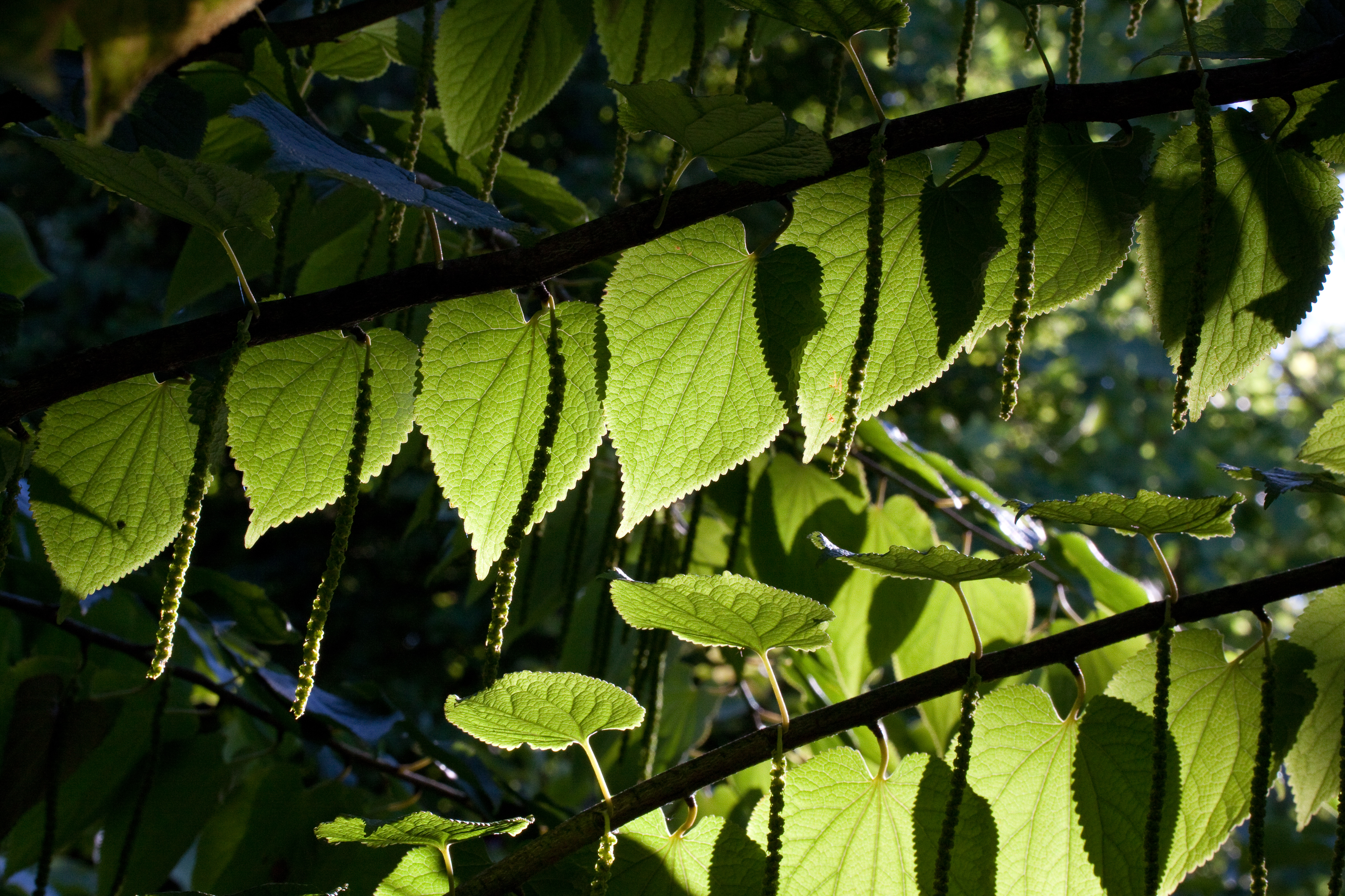 Tetracentron sinense - Feuilles et fleurs - Jardin botanique de Strasbourg - France